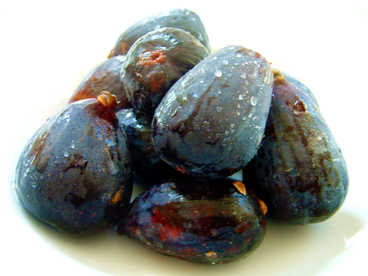 Mission Fig